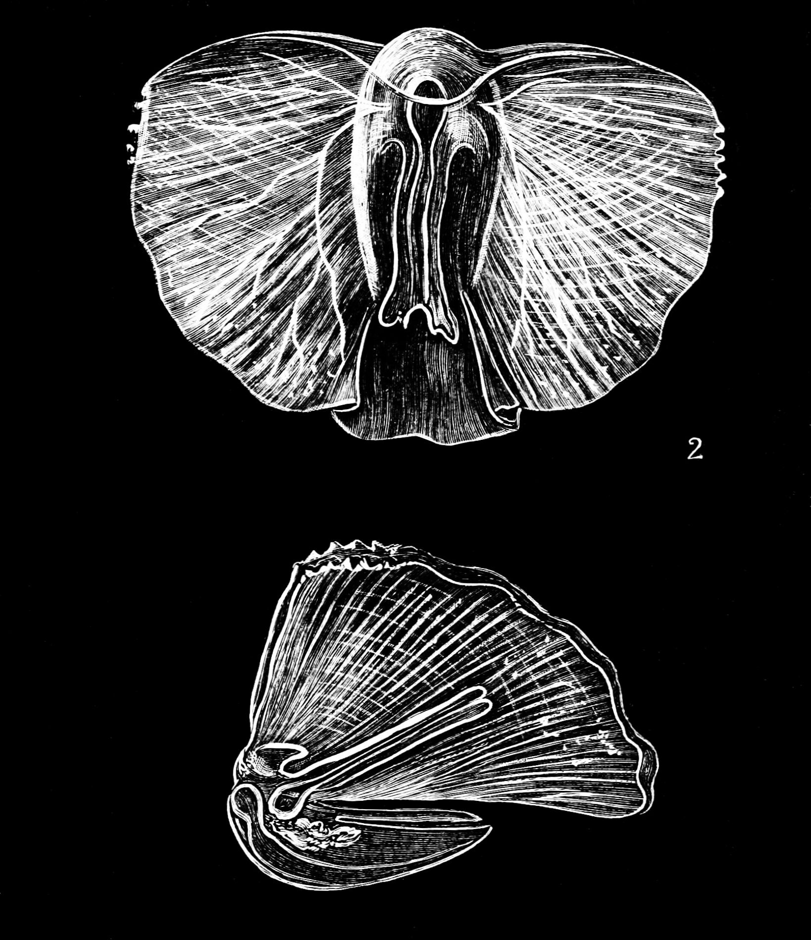 Tiedemannia